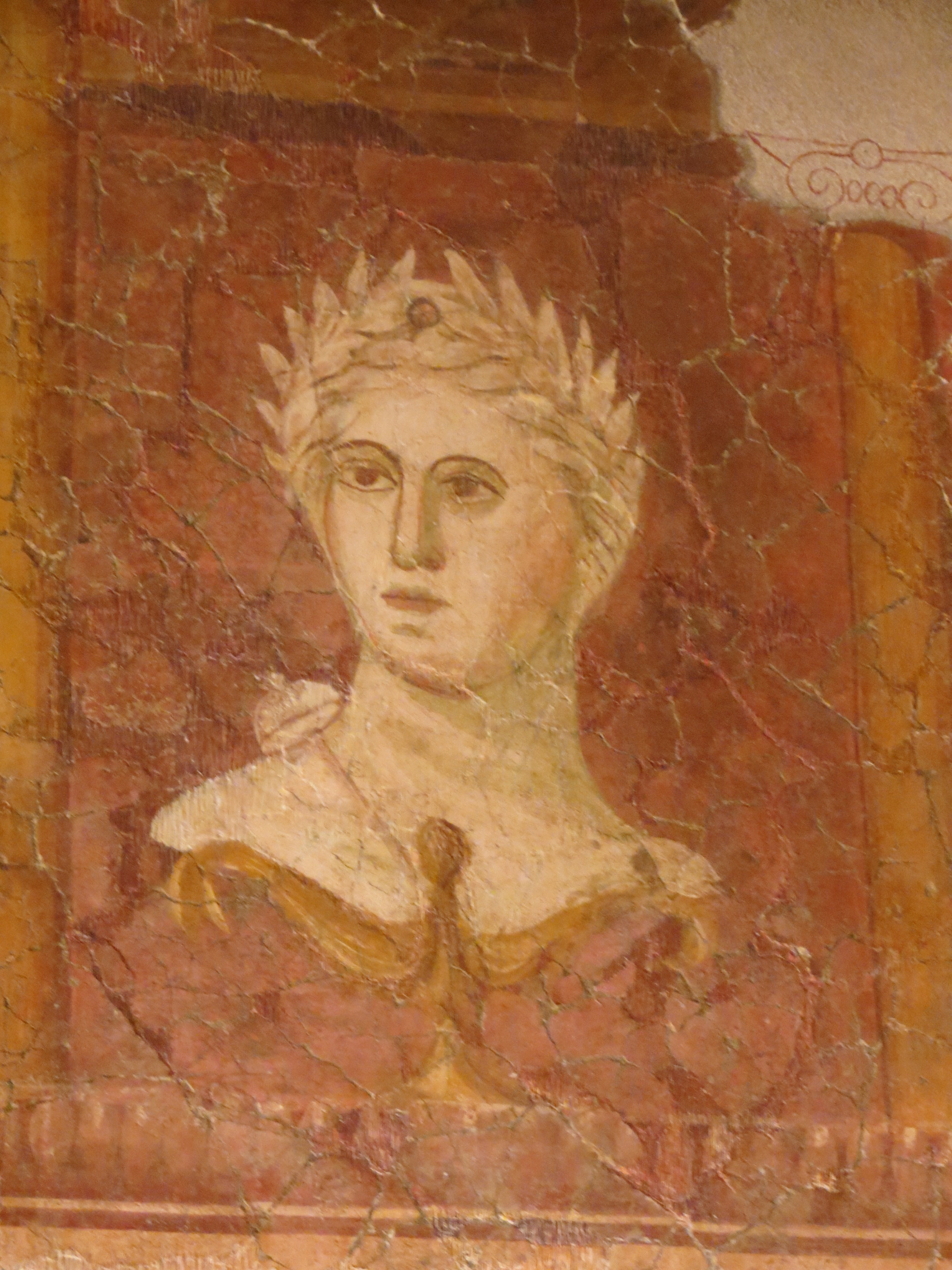 Musée archéologique de Narbonne, Aude, Languedoc-Roussillon.